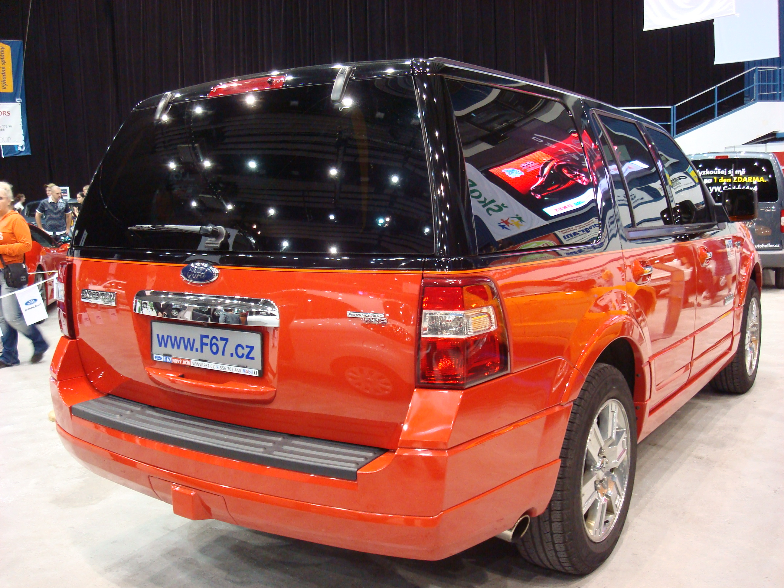 Motoršou 2009